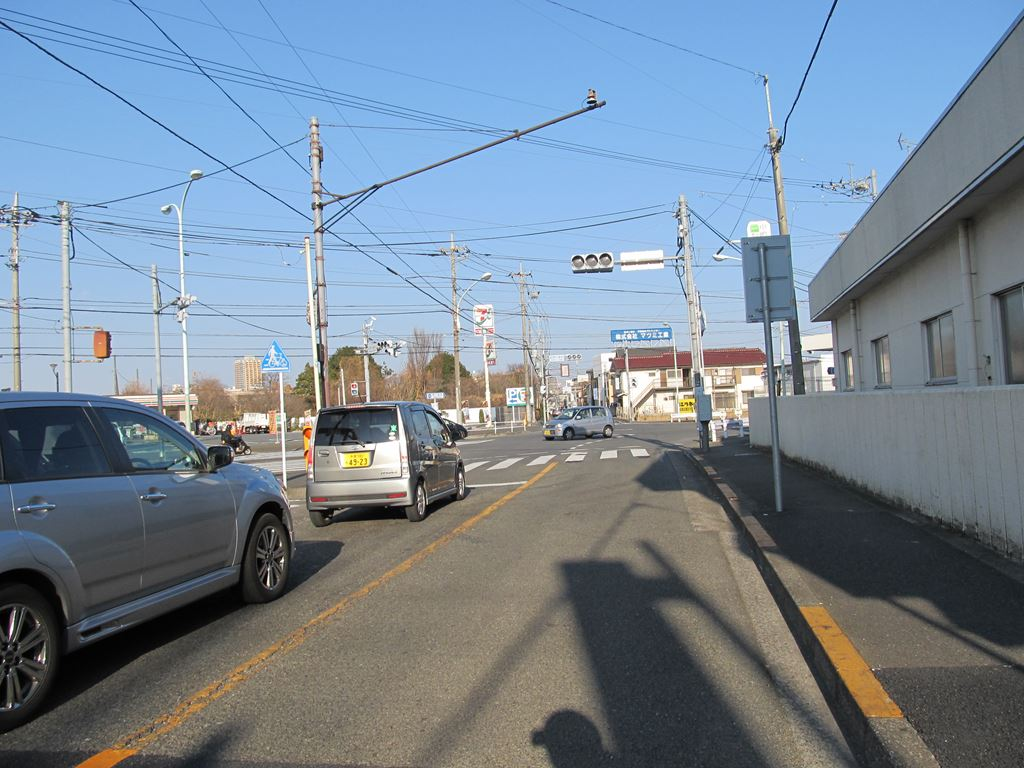 東京都道15号府中清瀬線小金井街道。東八との交差点。東京都府中市